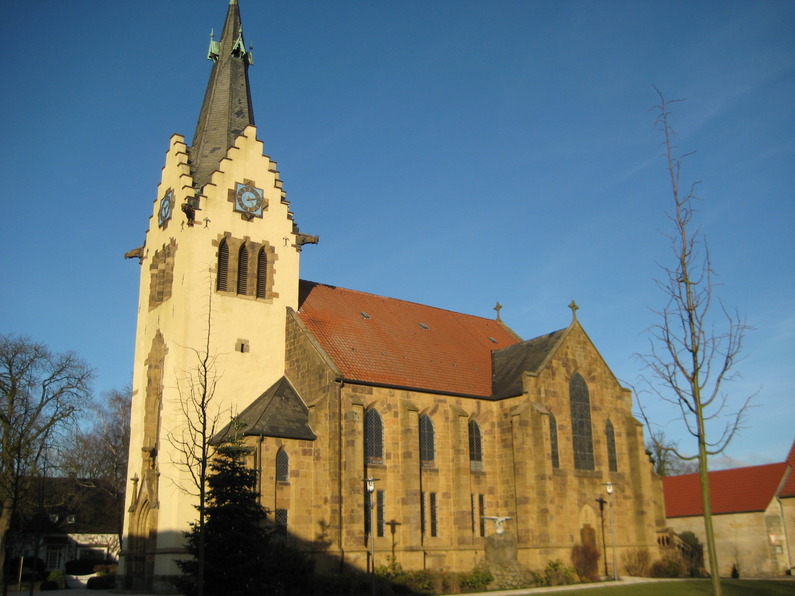 Ev.-luth. Kirche St. Johannes-der-Täufer in Hilter am Teutoburger Wald